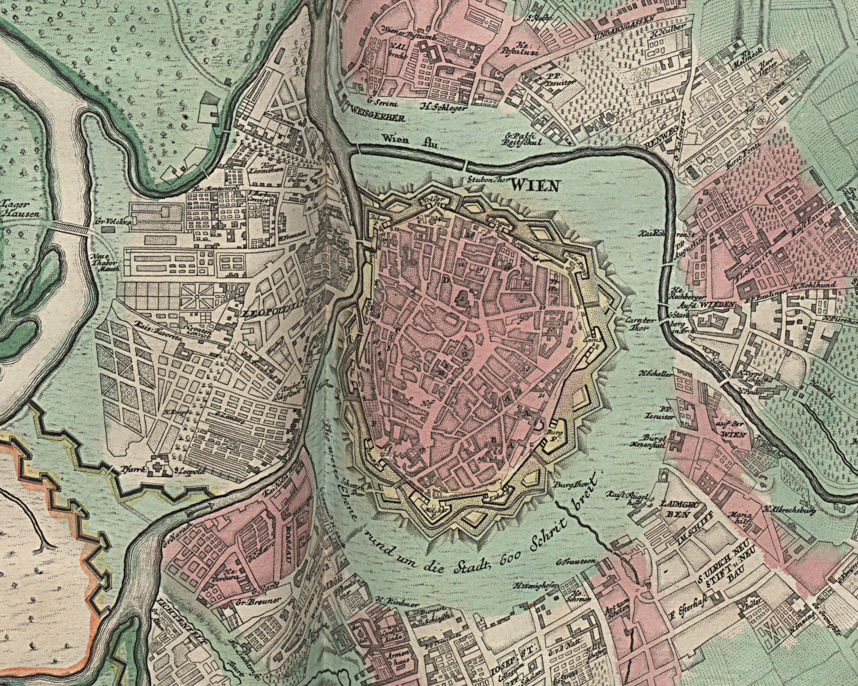 Wien